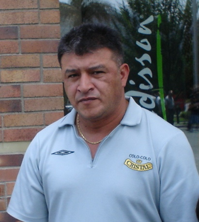 Claudio Borghiun ex campeon del mundo EL GRAN BICHI!!